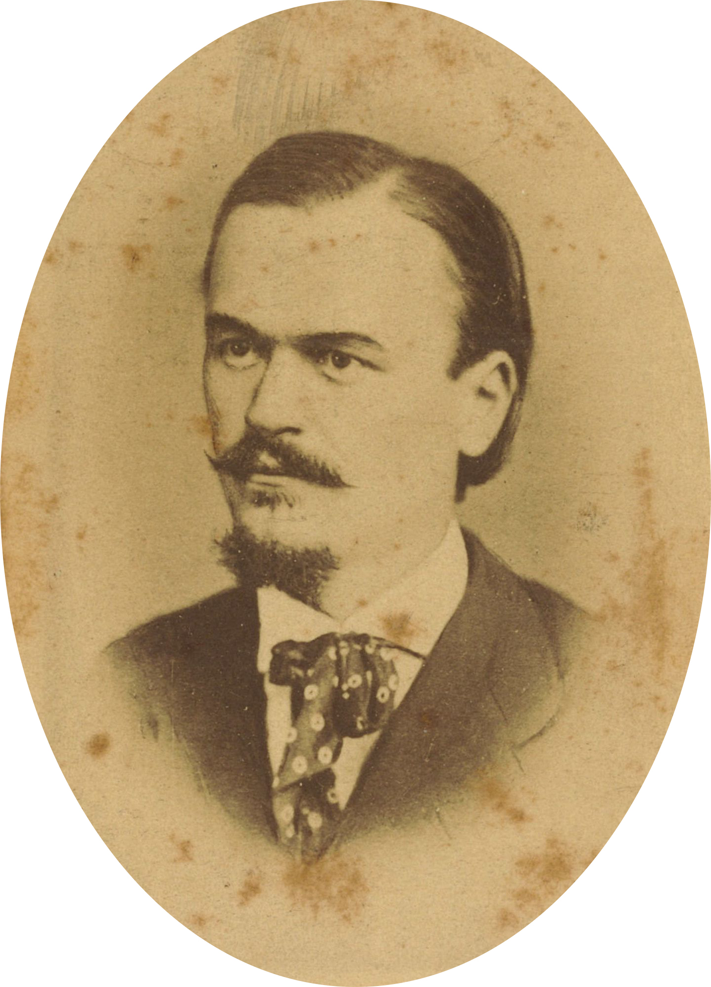 Josip Jurčič